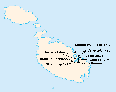 Répartition des clubs en First Division Maltaise 1917-1918.